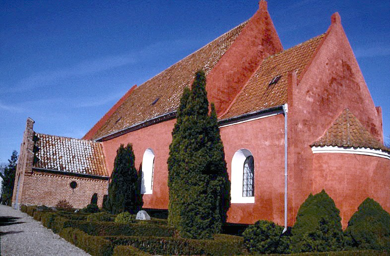 Nørre Kirkeby Kirke i Danmark. Nørre Kirkeby kirke